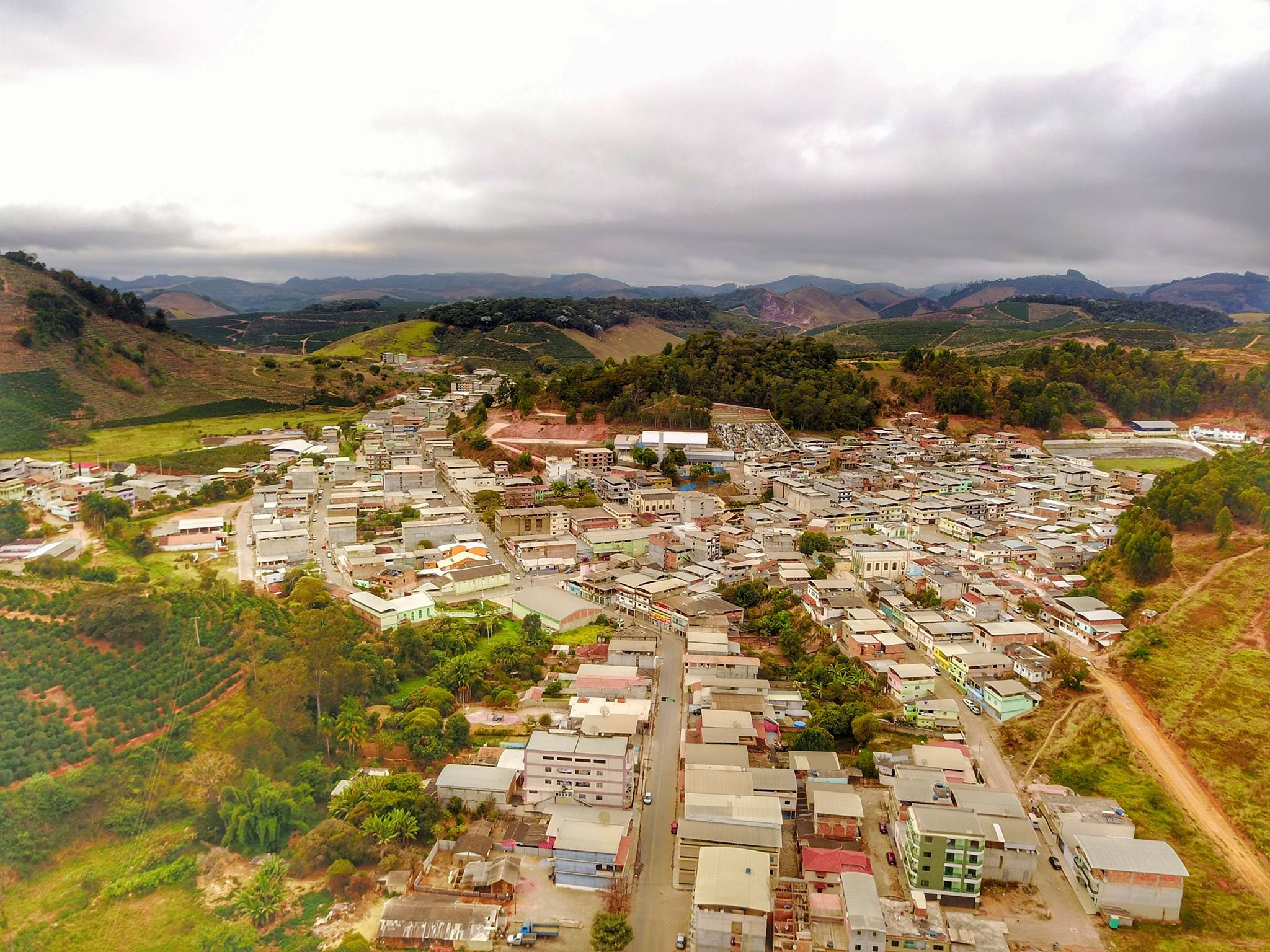 Vista aérea do Centro de Irupi